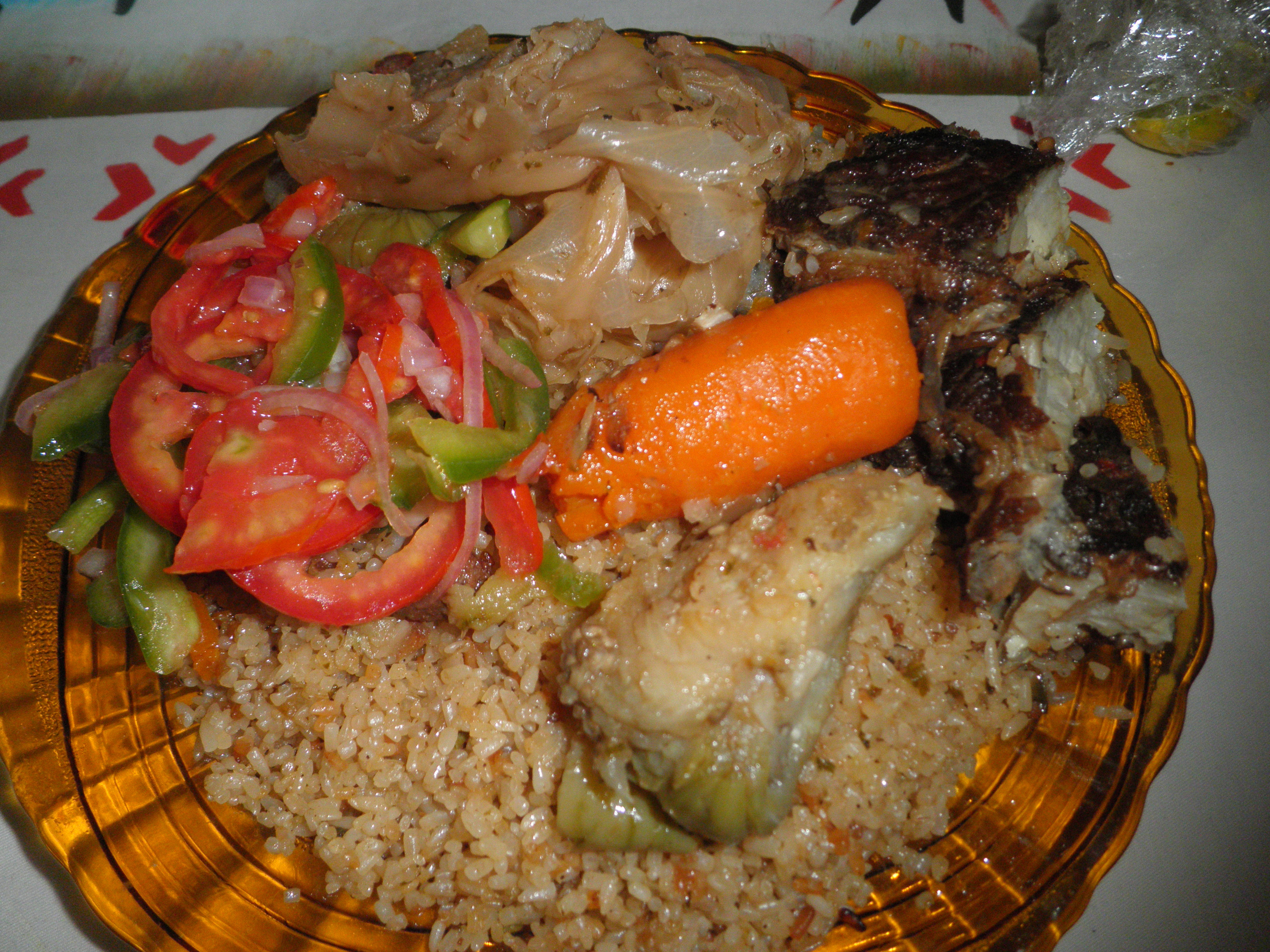 Il s'agit d'une assiette de riz au poisson ou thiéboudiène.C'est le plat typique sénégalais que l'on accompagne de légumes divers, carotte,aubergine,poivron,choux et autres.En haut à droite, on aperçoit un morceau de citron dont le jus acidulé est très apprécié pour assaisonner ce plat.Sur cette photo, le thiéboudiène a été merveilleusement cuisiné par ma mère. This is an image of food from Senegal